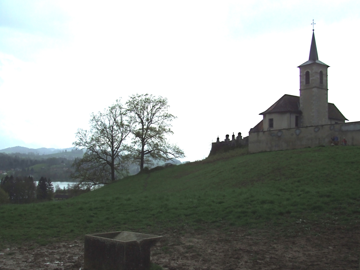 Église et paysage de Saint-Alban-de-Montbel en Savoie (France)